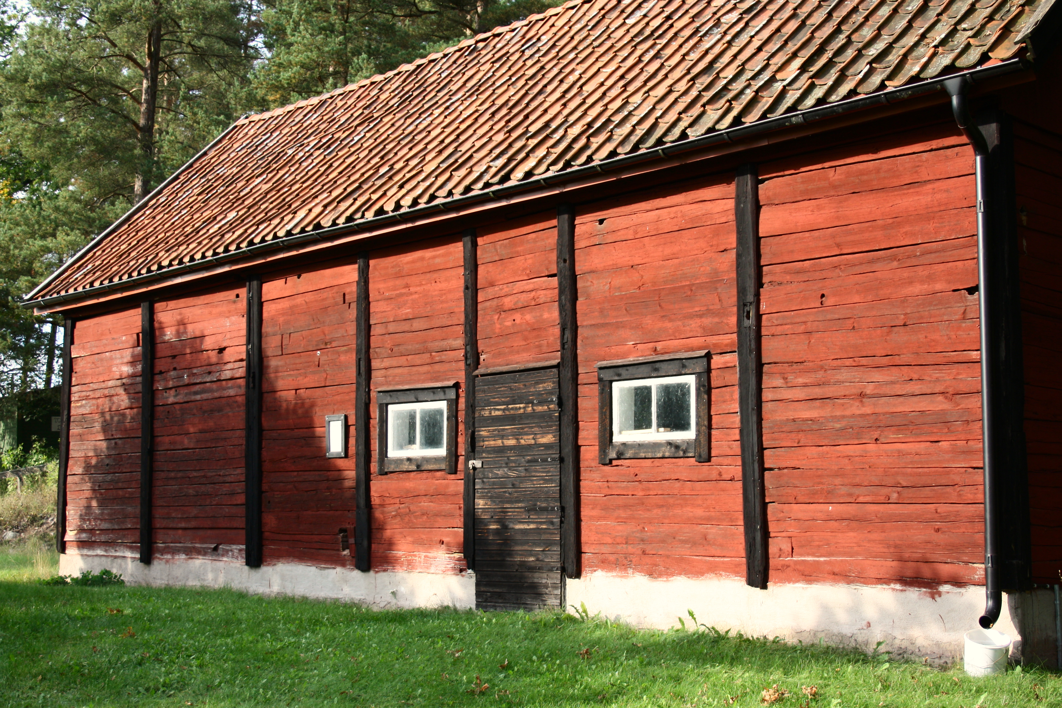 Ekonomibyggnad till Bötterums hembygdsgård